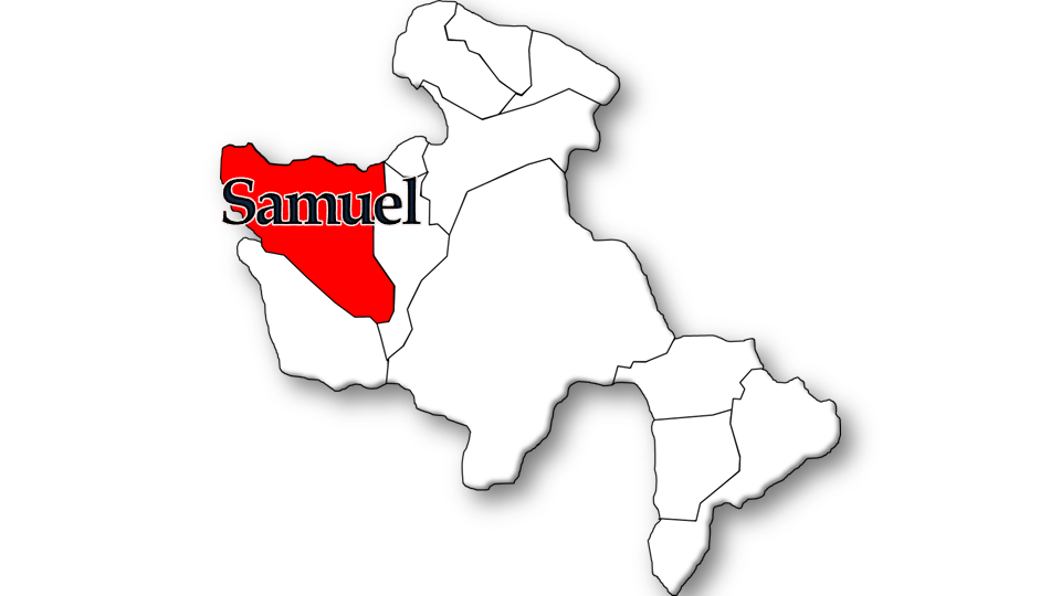 População